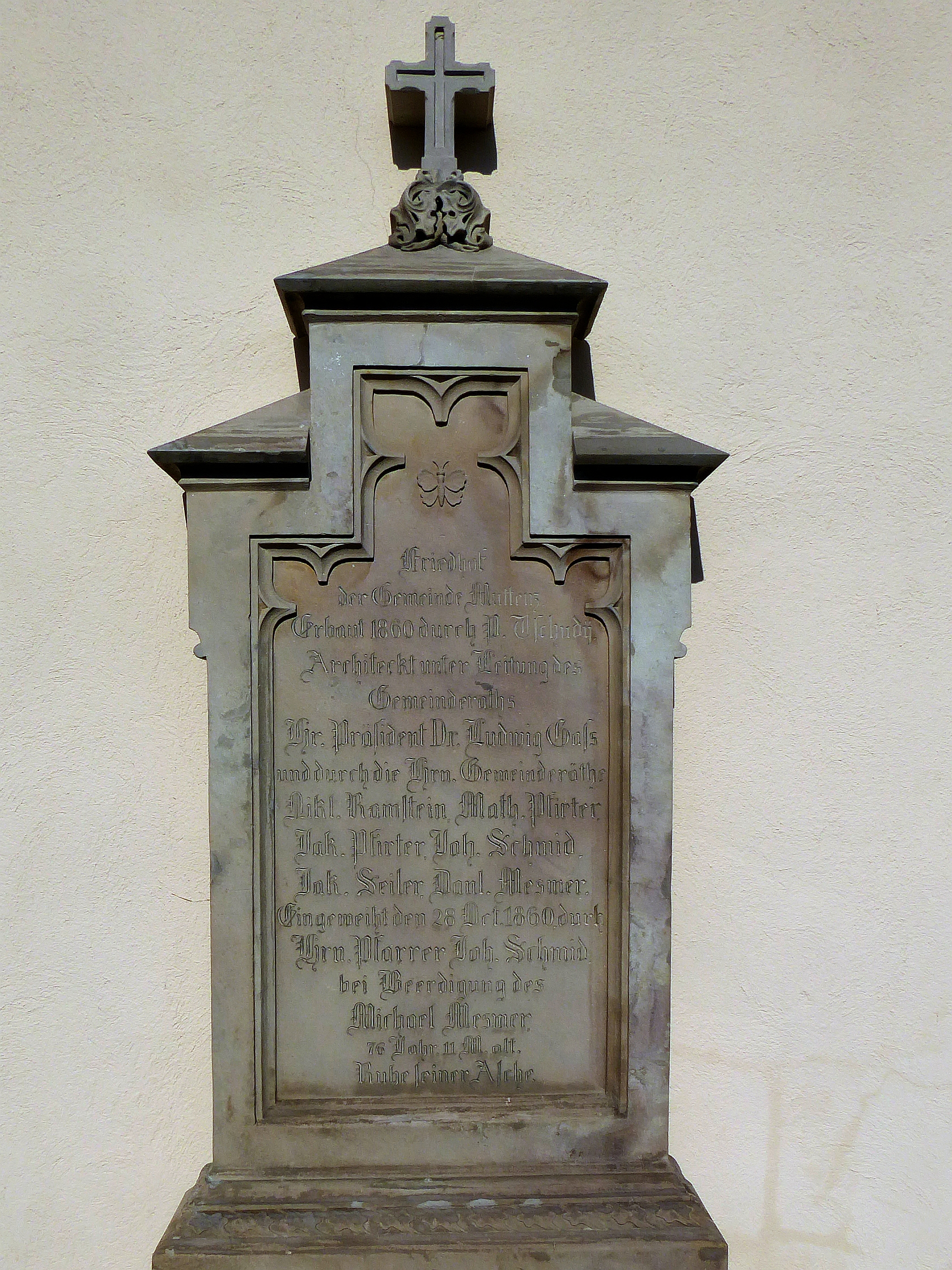 Gedenkinschrift, Friedhof Muttenz, 1860